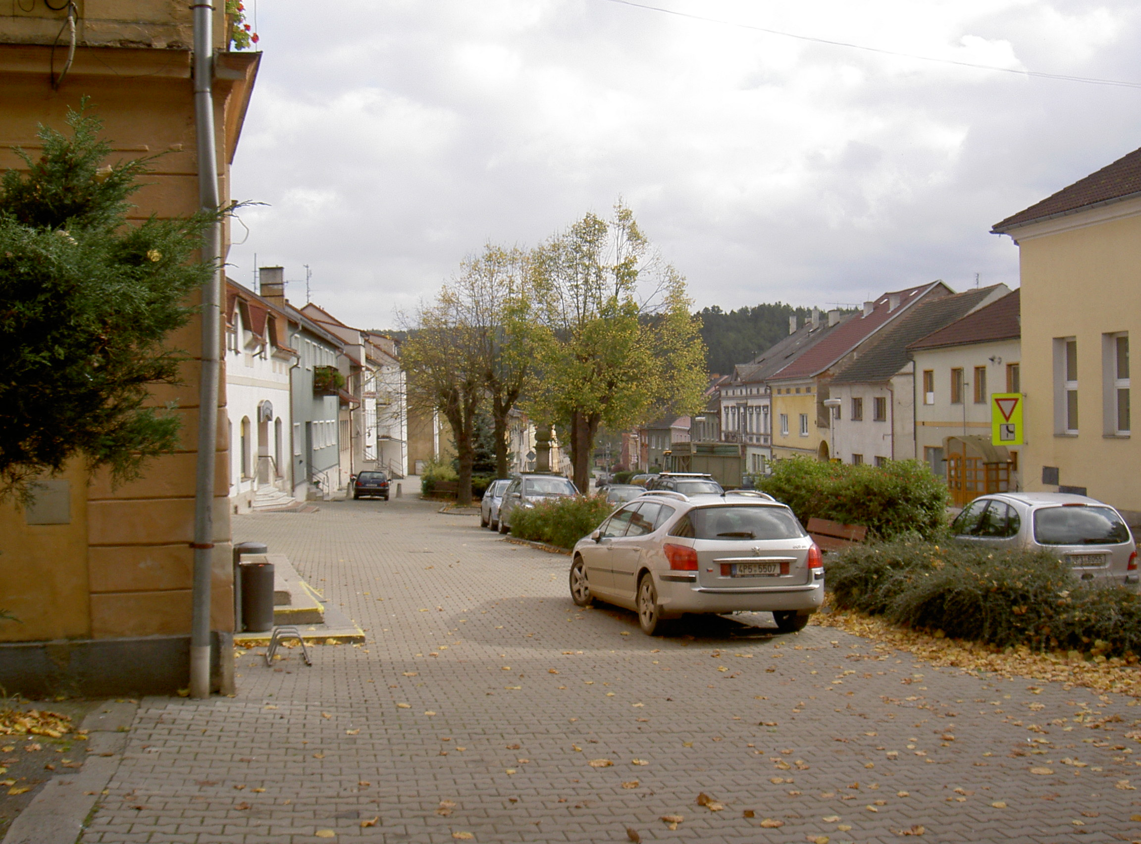 Hostau